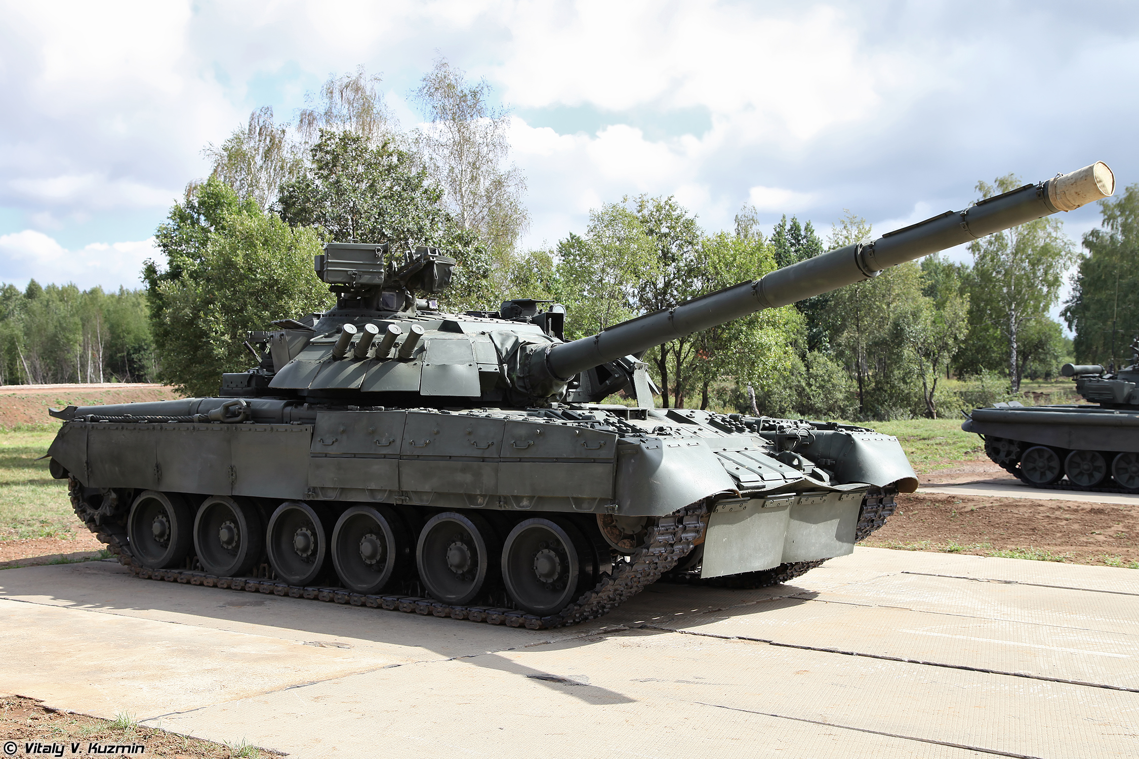 Т-80УЕ-1 (T-80UE-1 tank)